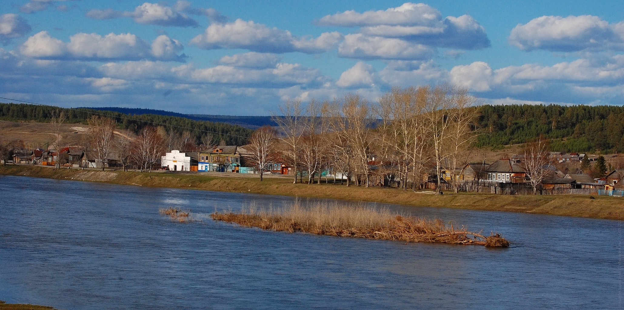 Село Шемаха́ Нязепетровского района Челябинской области стоит на реке Уфе